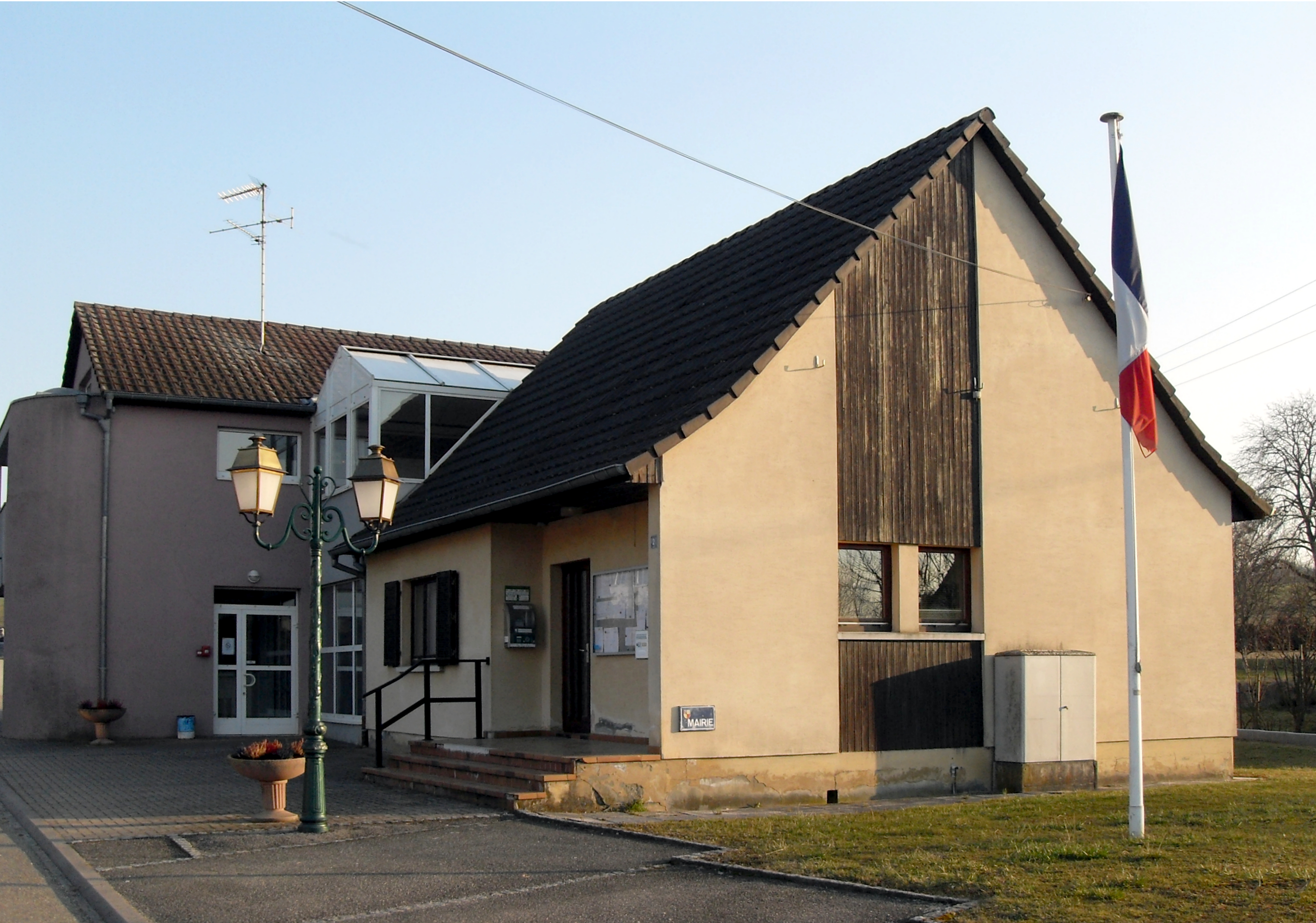 La mairie d'Heiwiller